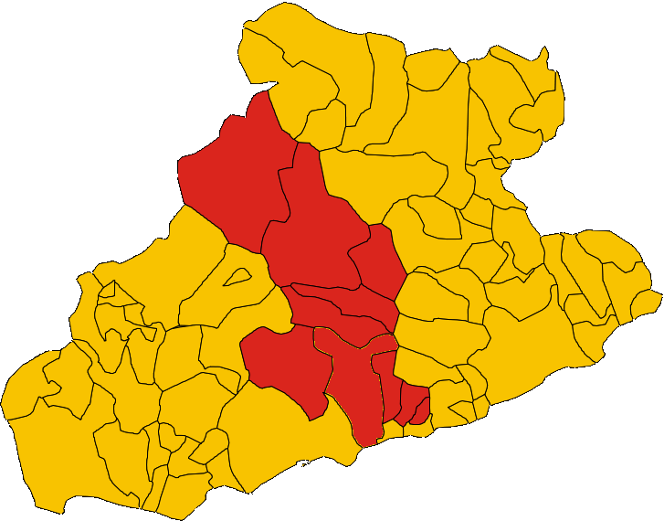 Mappa della Comunità Montana Argentina Armea (Provincia di Imperia, Liguria, Italia) con i comuni originari dal 1973 al 2009